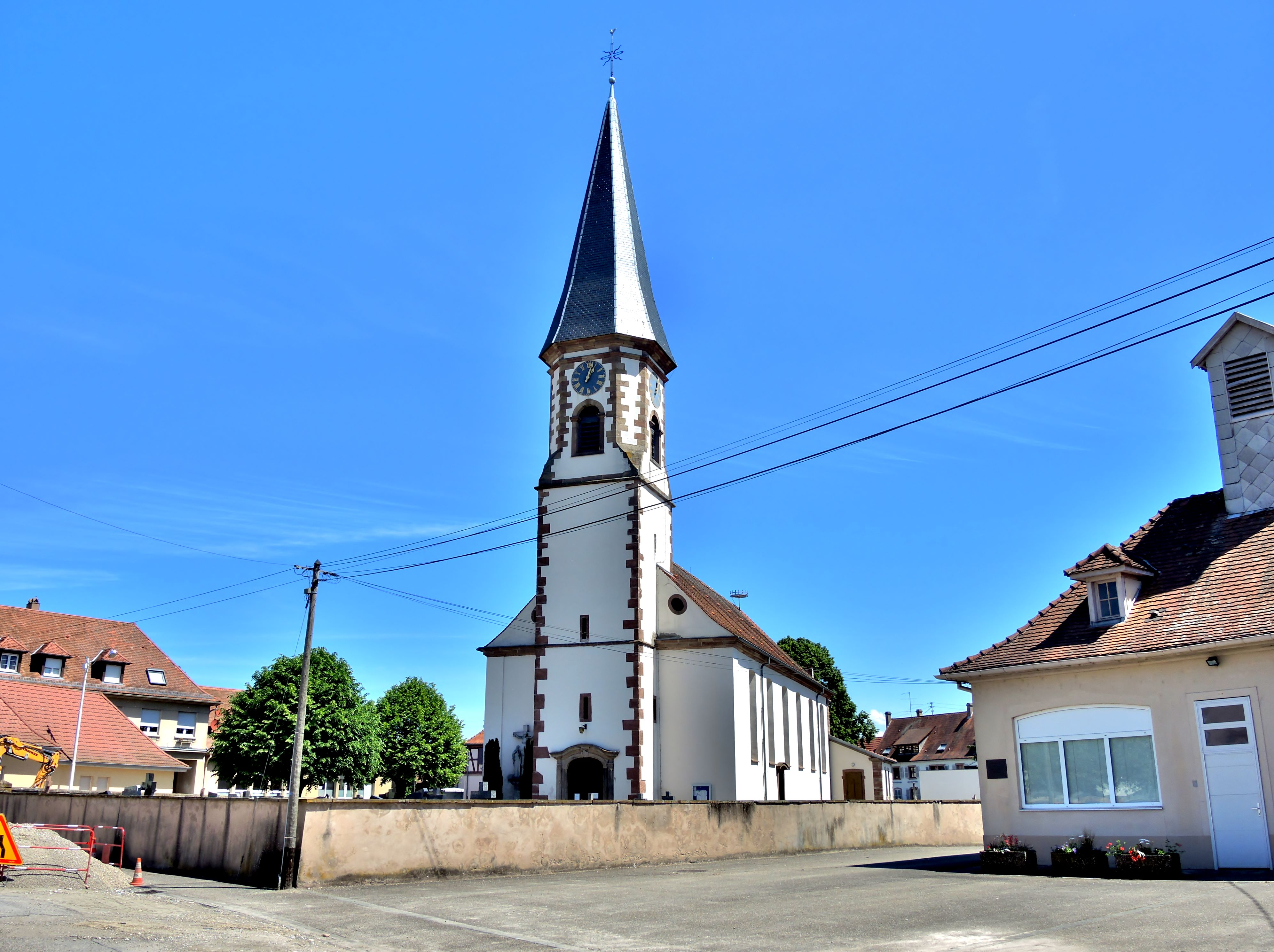 Eglise Sainte Barbe d'Herbsheim. Bas-Rhin.